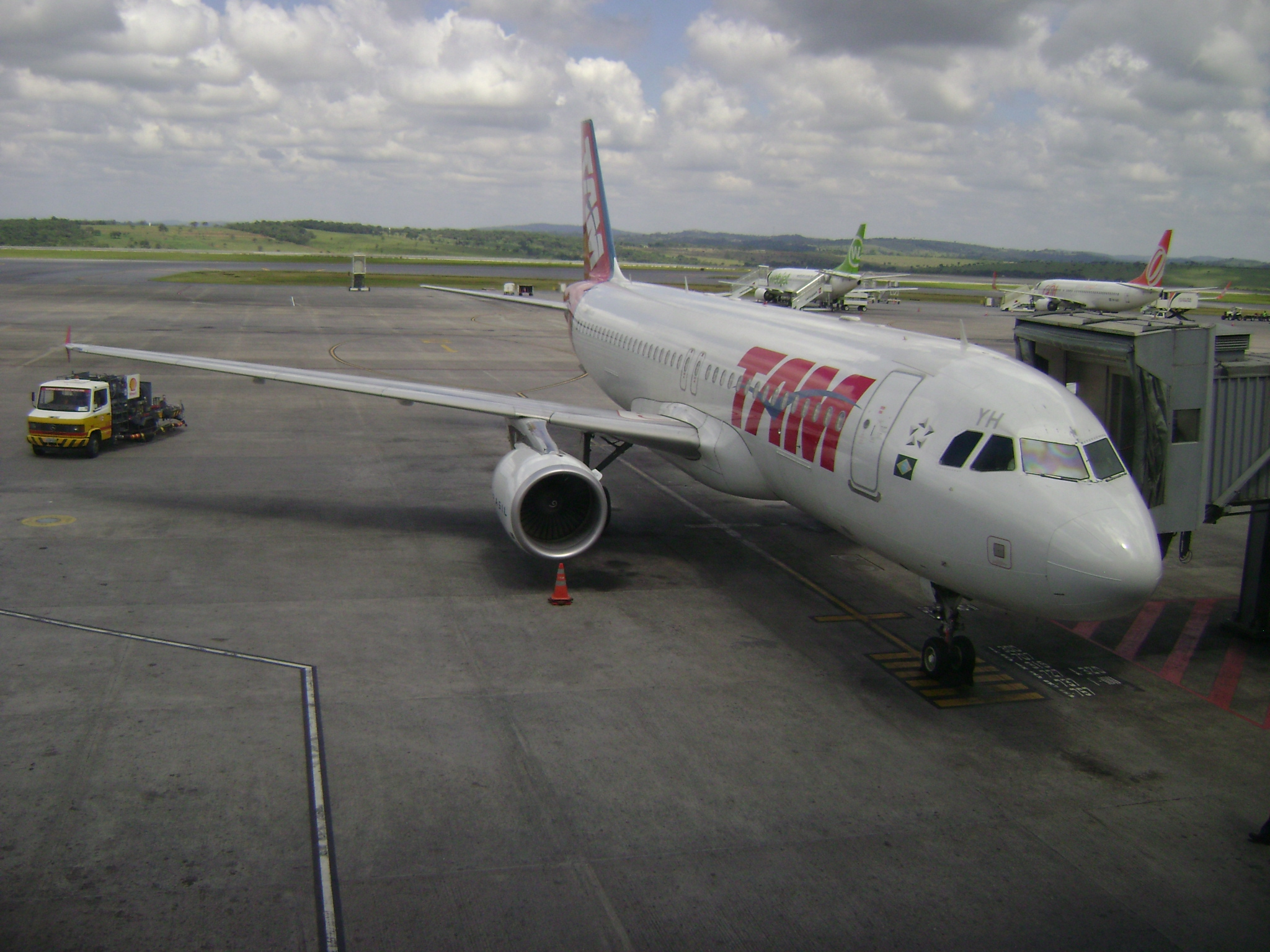 Avião da TAM no Aeroporto Internacional de Belo Horizonte-Confins, em Minas Gerais, Brasil.